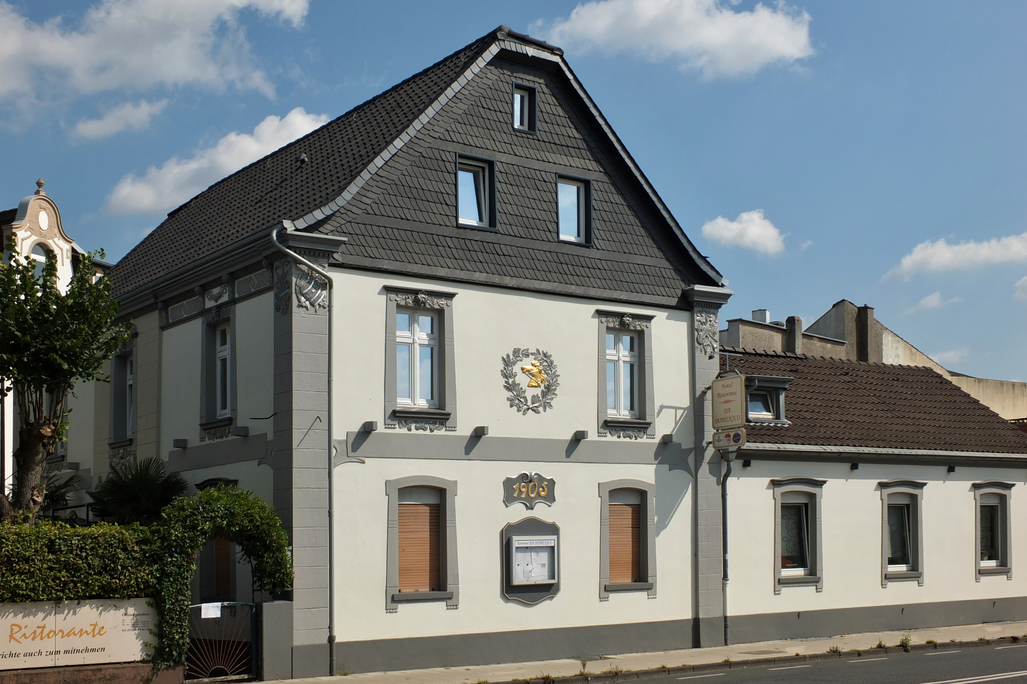 Gaststätte Zum Hagelkreuz, Ansicht Richrather Straße, HildenThis is a photograph of an architectural monument.